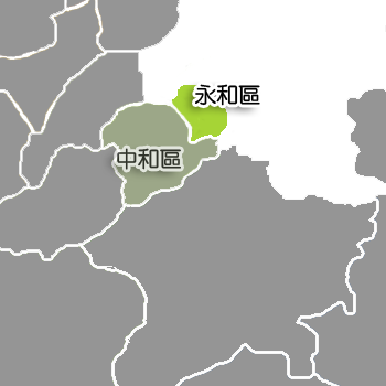 中文（台灣）: 新北市永和區相對位置。